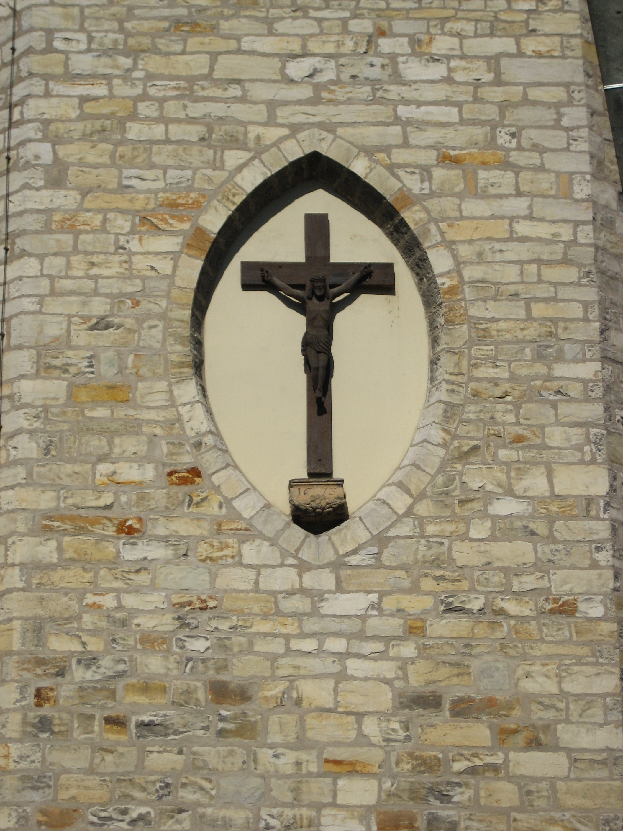 Kruzifix am Chor der katholischen Kirche St. Dionysius und Urban in Paderborn-Elsen. Datiert ist es auf 1673.